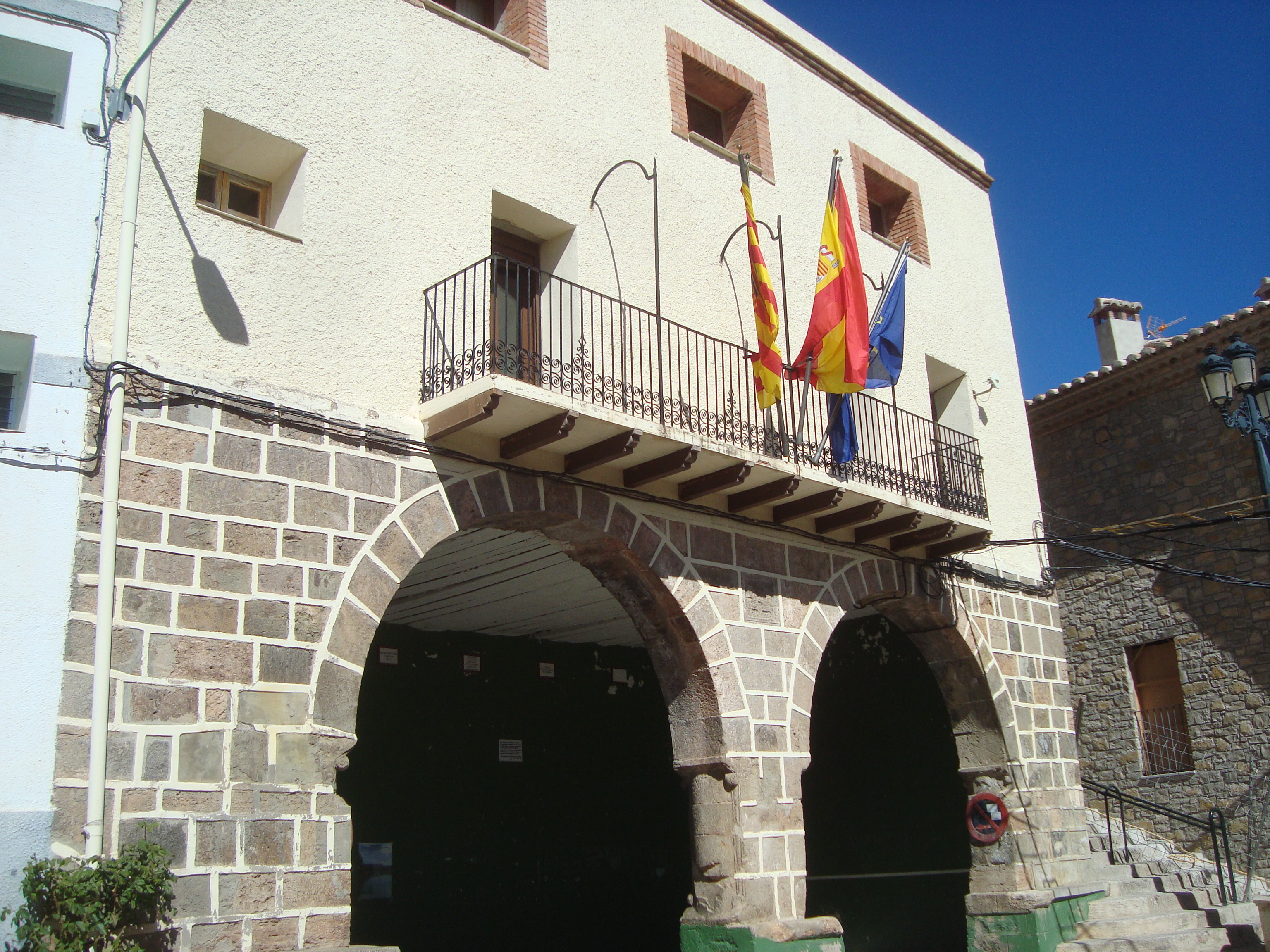 Ayuntamiento de Torrijas (Teruel)